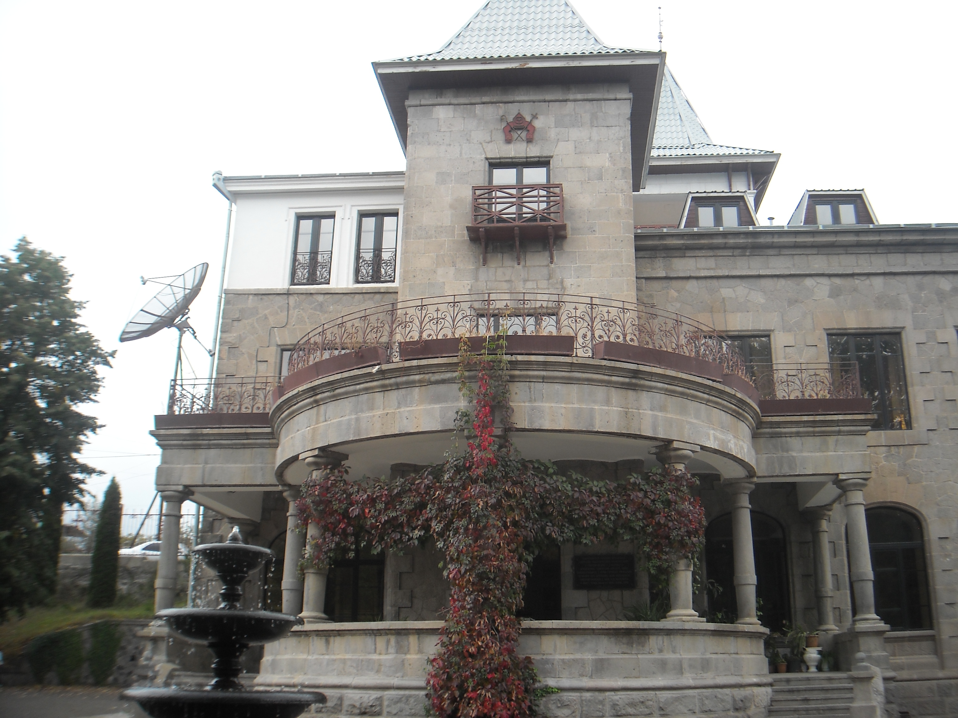 Եղել է մեծահարուստ Թաիրովի ամառանոցը,խորհրդային կարգերի օրոք` «Կիրովական» սանատորիայի մասնաշենքը, այժմ Գուգարաց թեմի առաջնորդարանն է: Շրջակայքում կան տարբեր տեղերից բերված կոթողային հուշարձաններ 1/1